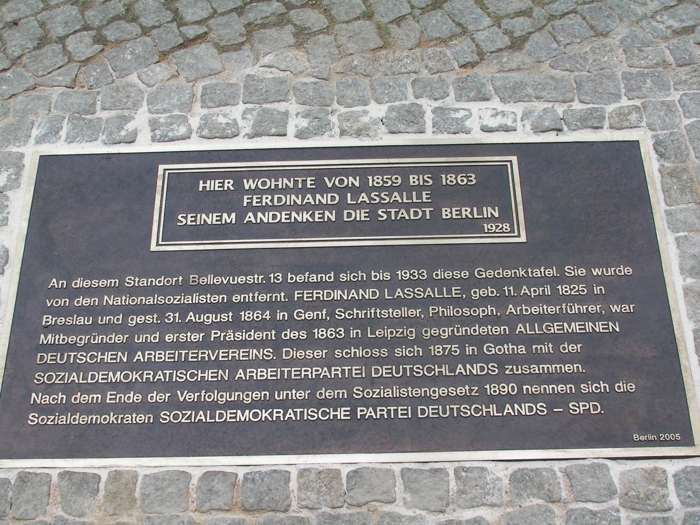 Berlin-Mitte, Bellevuestraße, Gedenktafel für Ferdinand Lassalle